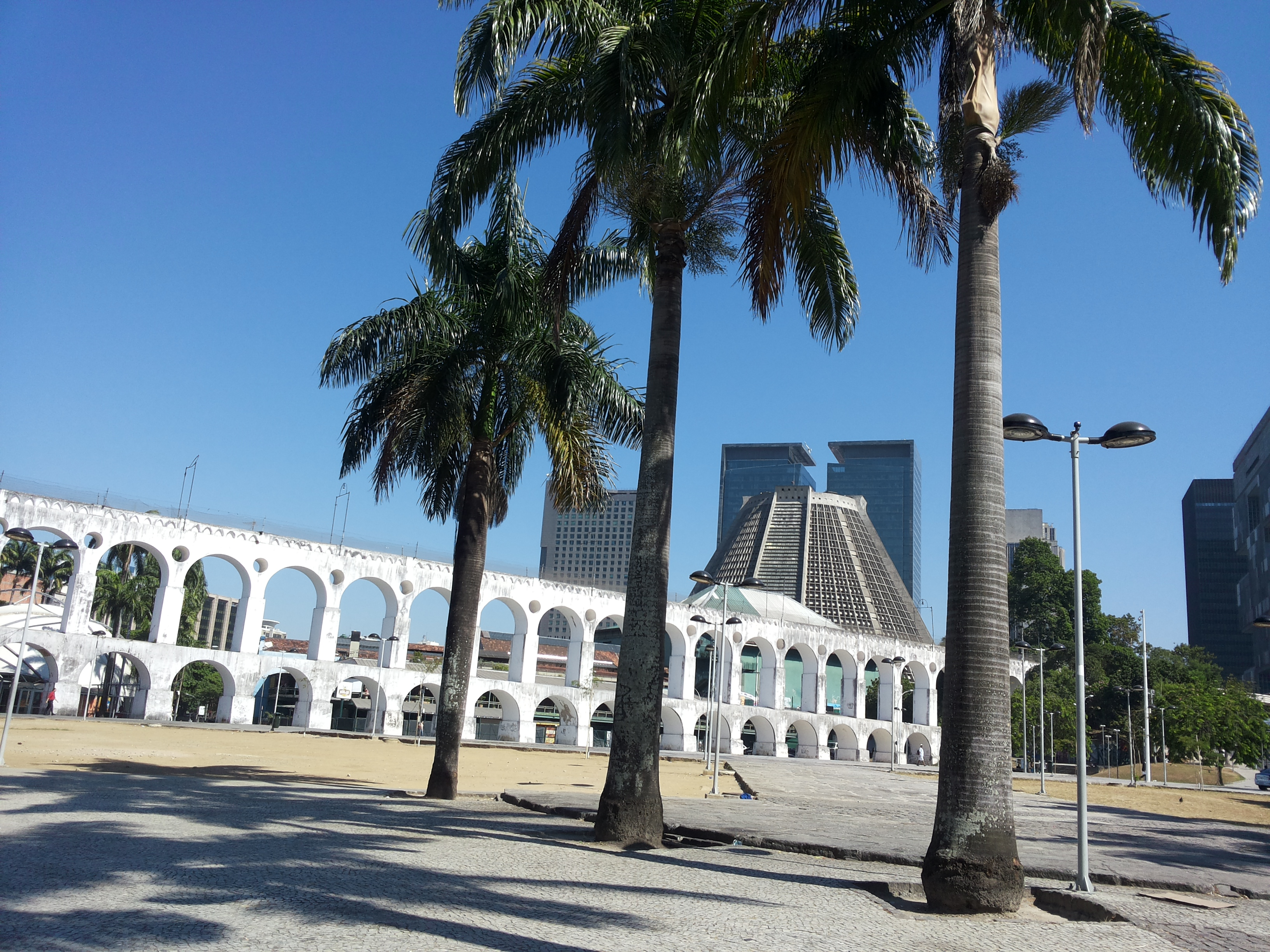 Descrição_para_sua_foto